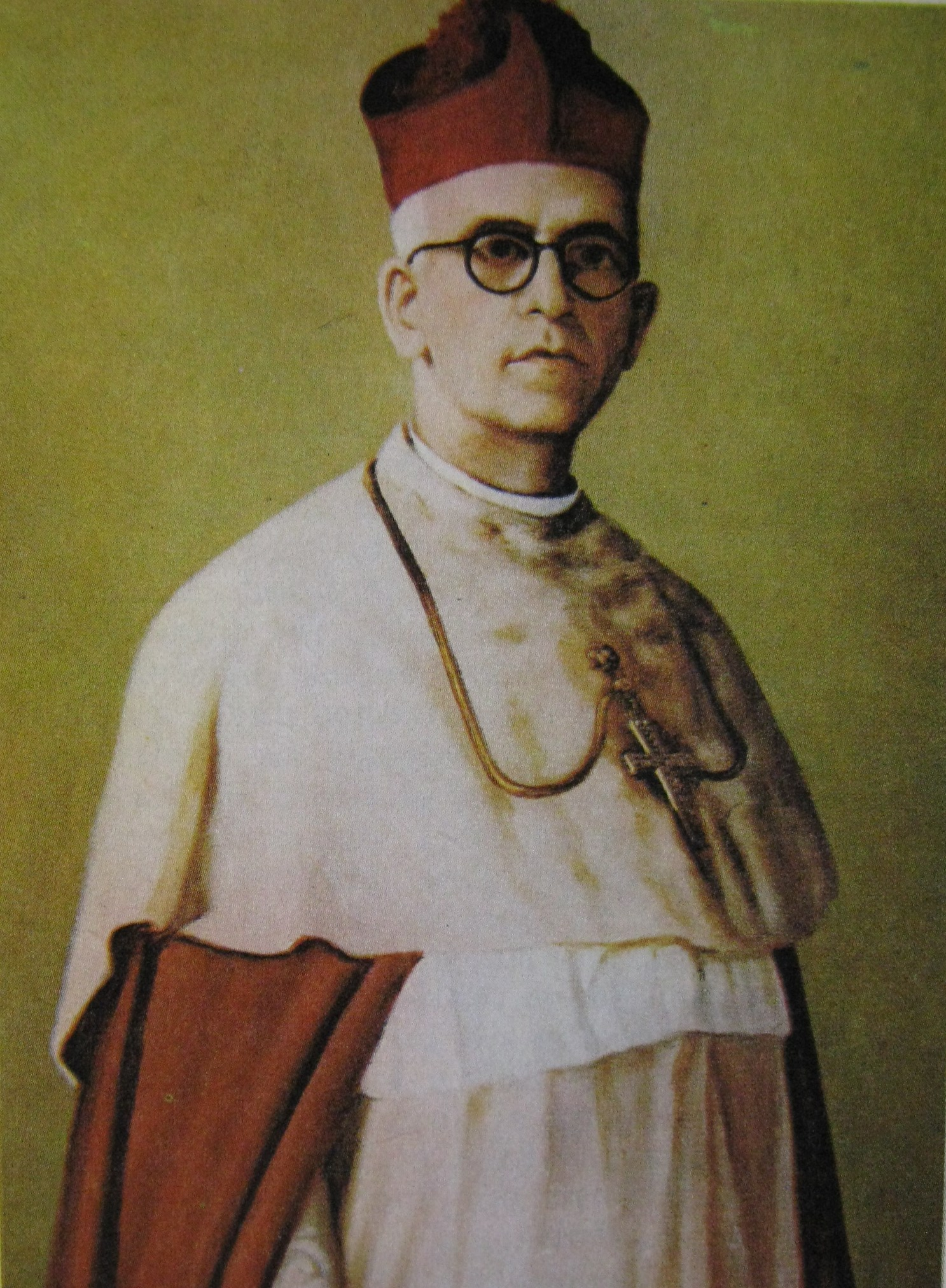 Fotografía del cuadro de mons. Joaquín García Benítez, Arzobispo de Medellín entre 1942-1958.